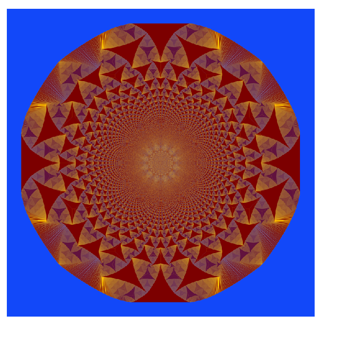 ASM en un grid.